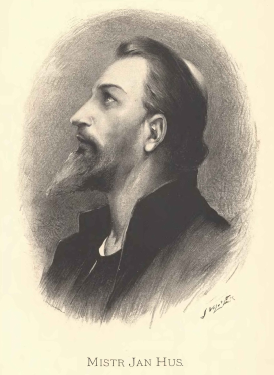 Portréty předních osobností od Jana Vilímka